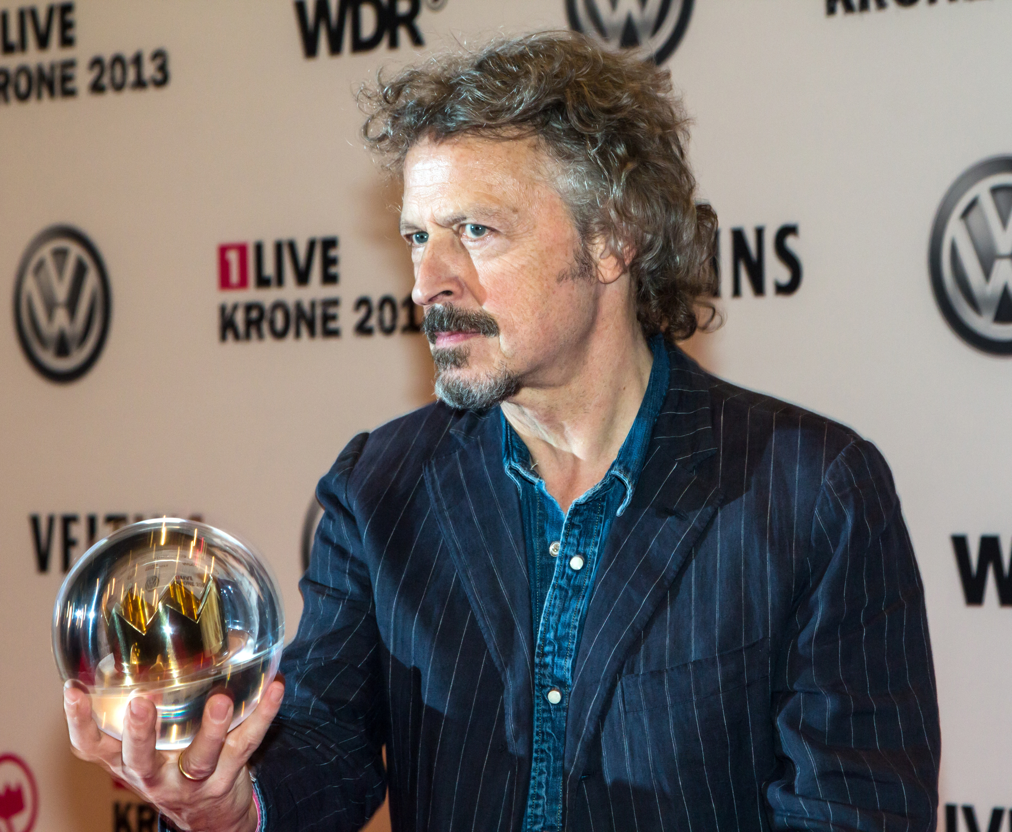 1 LIVE Krone 2013 Preisträger Wolgfang Niedecken